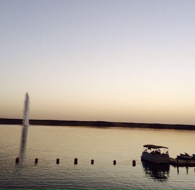 بحيرة دومة الجندل وتظهر فيها النافورة